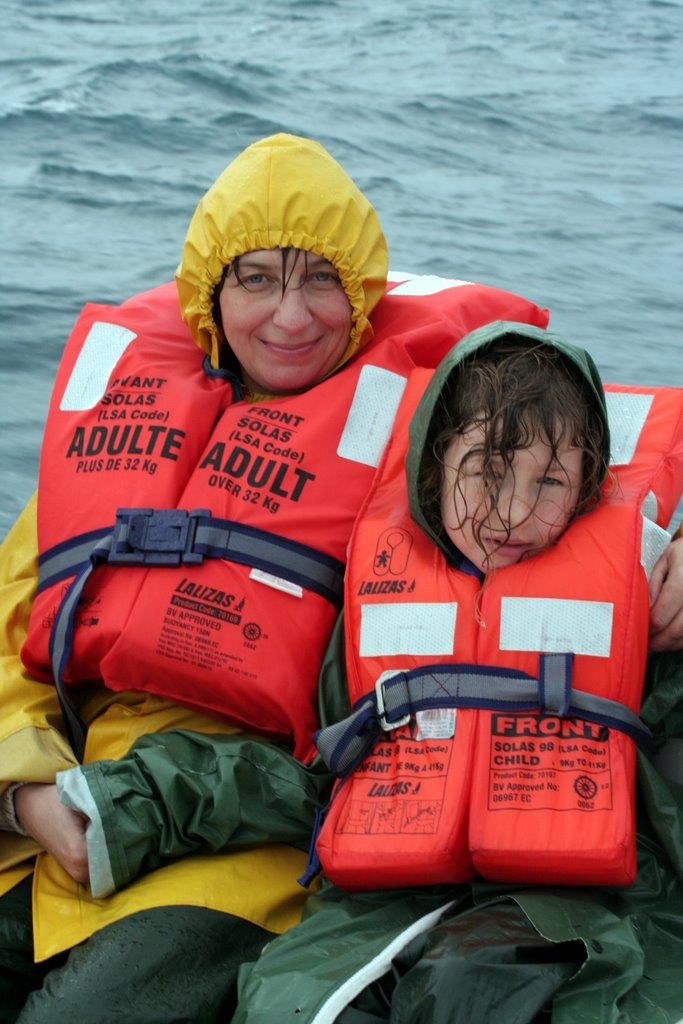 Picture 352